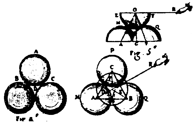 Contact des atomes selon Belidor